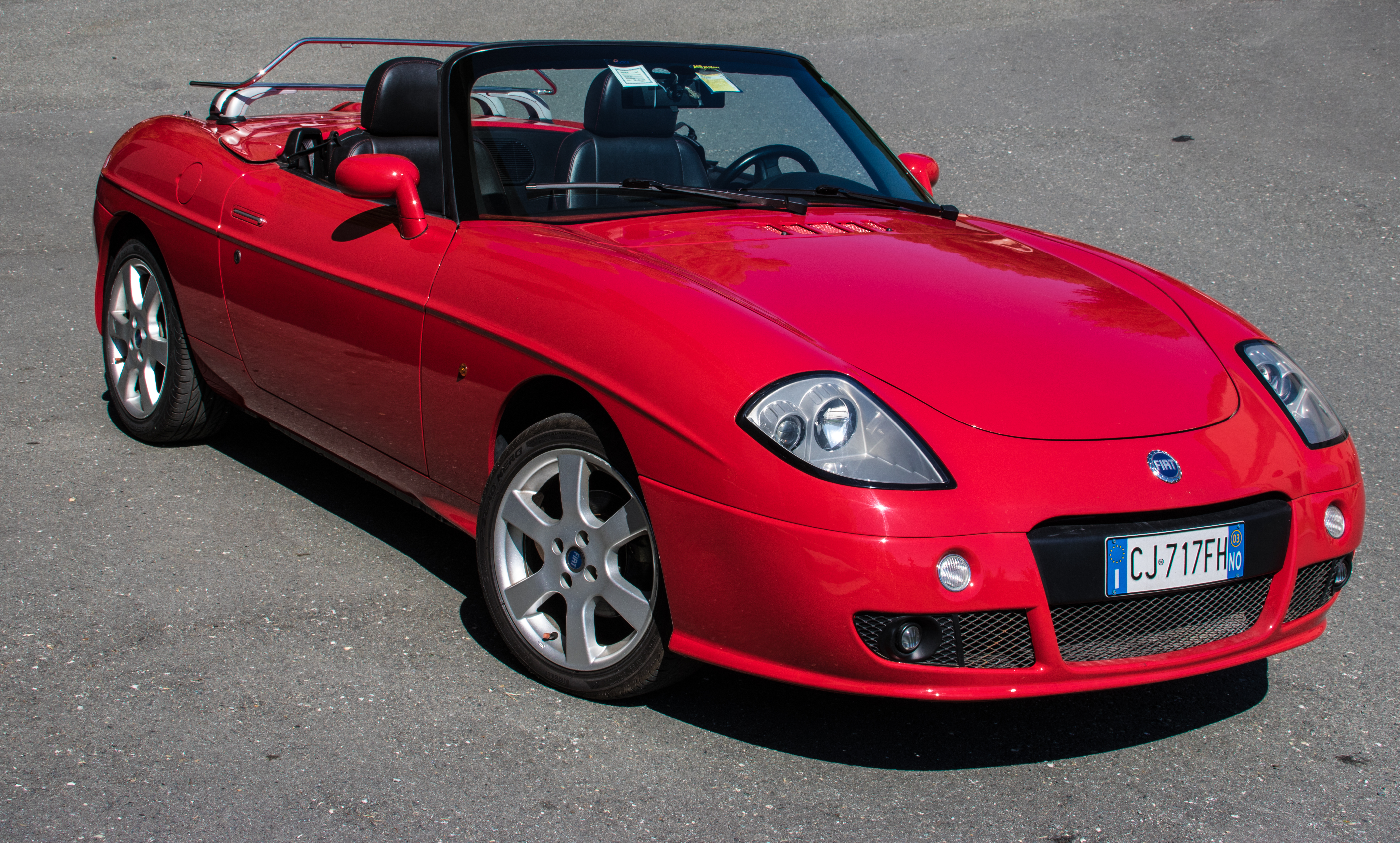 Fiat Barchetta